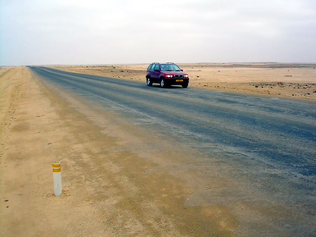 Küstenstraße C34 in Namibia